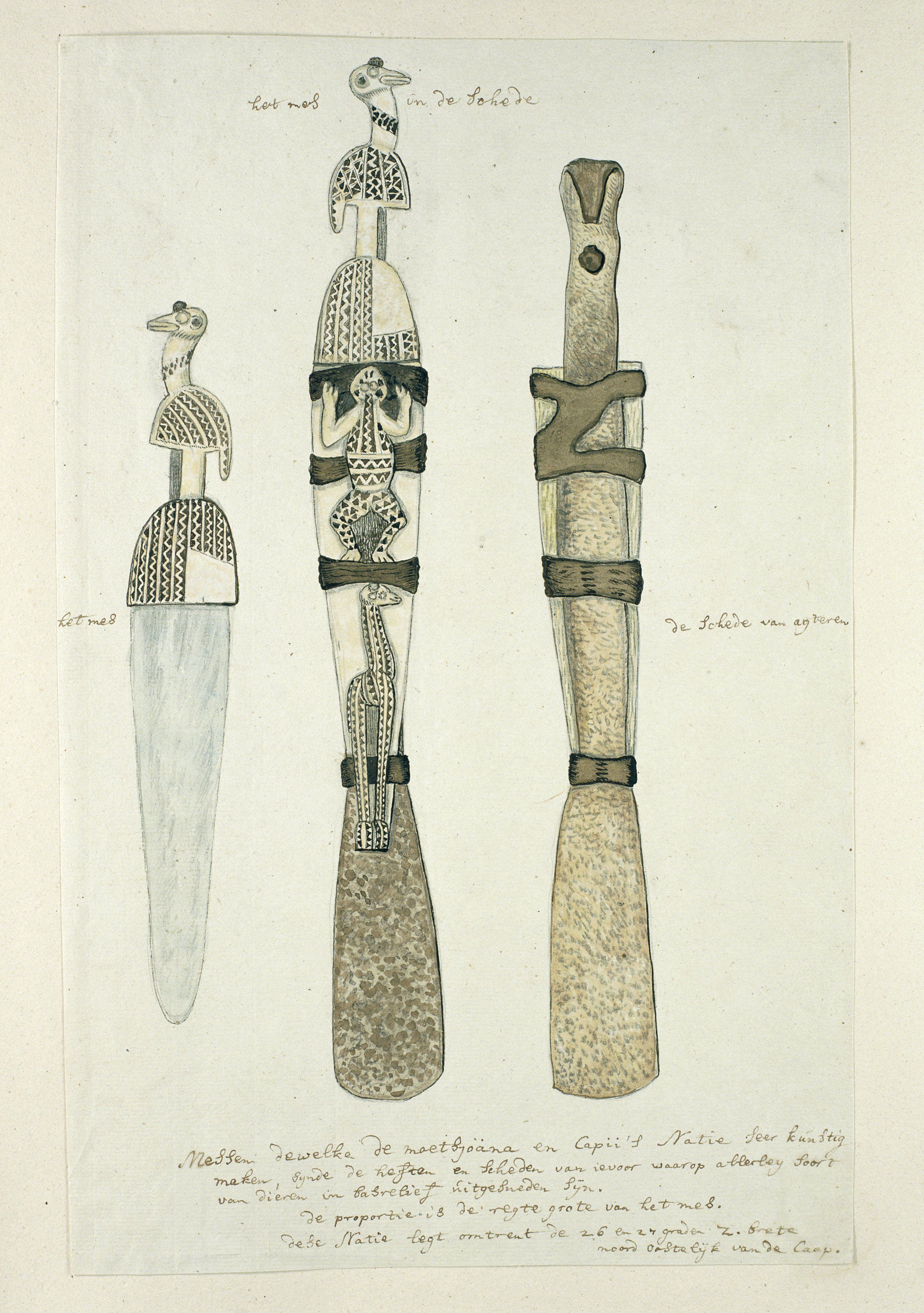 IdentificatieTitel(s): Een mes met schede, Tswana or KoraObjecttype: tekening albumblad Objectnummer: RP-T-1914-17-92Opschriften / Merken: annotatie, middenboven, links, rechts, onder, pen in bruin: ‘m.b.: het mes in de Schede (aan weerszijden van het mes); links: het mes; rechts: de Schede van agteren; onderaan: Messen dewelke de Moetsjoana en Capii's Natie Seer kunstig / maken, Sijnde de heften en Scheden van ievoor Waar: op allerley Soort / van dieren in basreleif uitgesneden Sijn. / de proportie is de regte grote van het mes. / dese Natie legt omtrent de 26 en 27 (24?) Z.brete / noord oostelijk van de Caap.’Omschrijving: Drie afbeeldingen van een mes met schede, van voren en achteren gezien, vervaardigd door de Moetjoanaas en de Capii.VervaardigingVervaardiger: tekenaar: Robert Jacob Gordon (toegeschreven aan)Datering: okt-1777 - mar-1786Fysieke kenmerken: pen in bruin, penseel in waterverf in kleuren, over potlood of zwart krijt; opgeplaktMateriaal: papier inkt potlood krijt Techniek: pen / penseelAfmetingen: albumblad: h 660 mm × b 480 mmblad: h 413 mm × b 267 mmToelichtingOntstaan tijdens één van de vier expedities door de Kaapprovincie van oktober 1777 tot maart 1786.Verwerving en rechtenCredit line: Aankoop met steun van particulierenVerwerving: aankoop 1914Copyright: Publiek domein